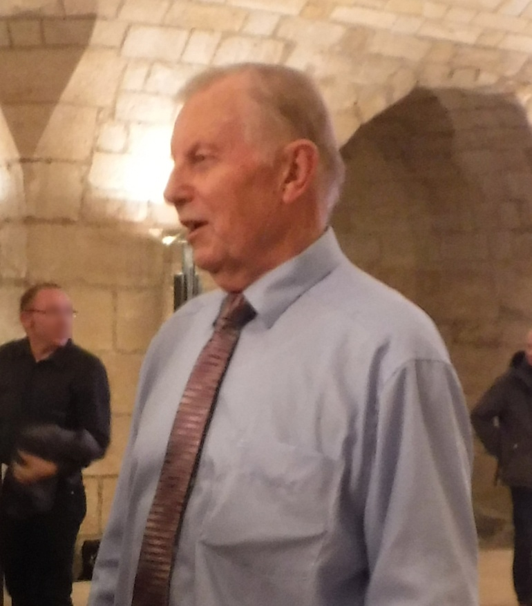 Prof. a. D. Dr.-Ing. Werner Gitt nach einem Vortrag in der Unterkirche der Dresdener Frauenkirche